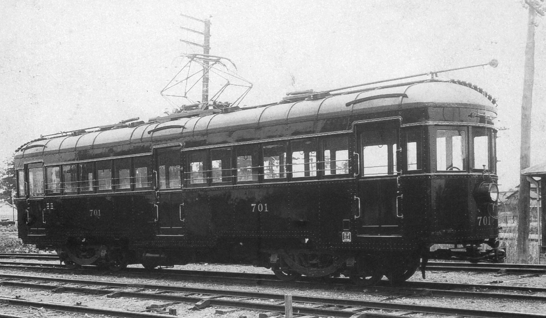 名古屋鉄道（初代） デセホ700形 名古屋市電乗入れのためパンタとポールの両方を装備